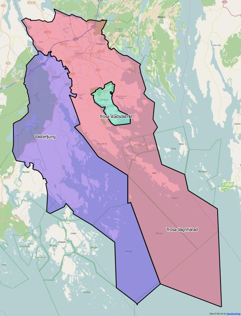 Distriktsindelningen i Tranås kommun World file: 72.24385294671792224 0 0 -72.24385294671792224 1929194.71577373729087412 8181341.85060618631541729